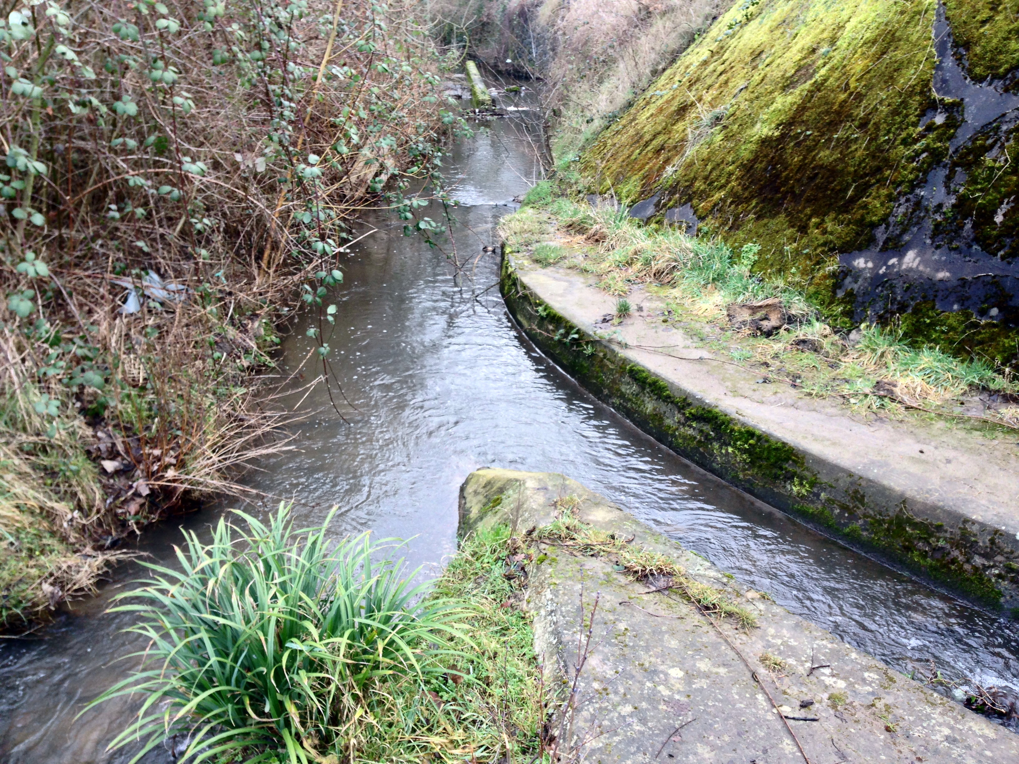 Mündung Endenicher Bach in den Dransdorfer Bach (Hardtbach)